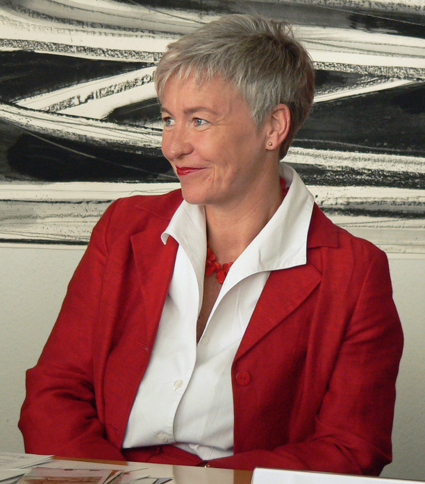 Katja Lembke bei Pressekonfrenz im Niedersächsisches Ministerium für Wissenschaft und Kultur